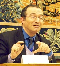 Hervé Mariton, lors du colloque de Réforme et Modernité le 4 mars 2009